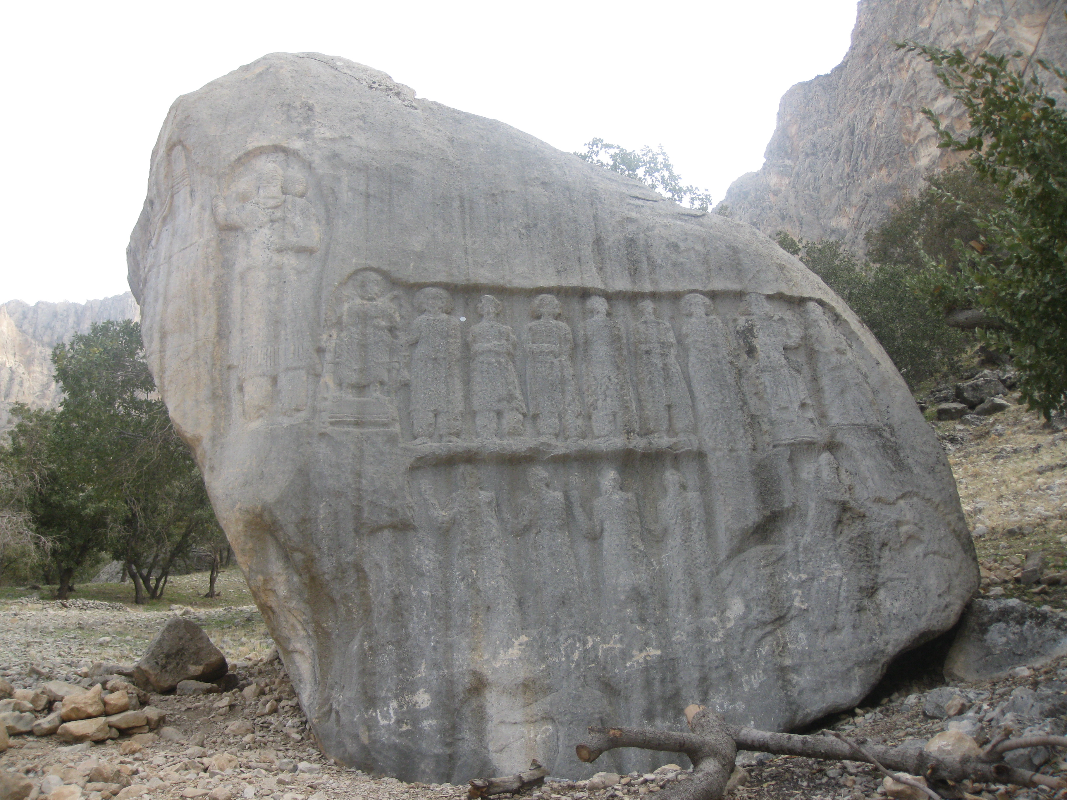 نقش برجسته سنگ سوم تنگ سروک